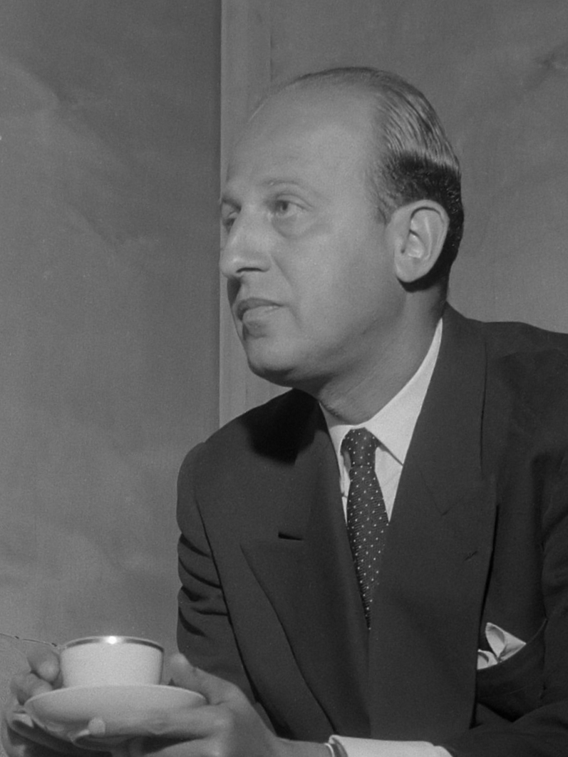 Persvoorstelling van filmechtpaar Yves Cjampi Kishi Keiko . Film "Typhoon boven Nagassaki " Floratheater 20 juni 1957